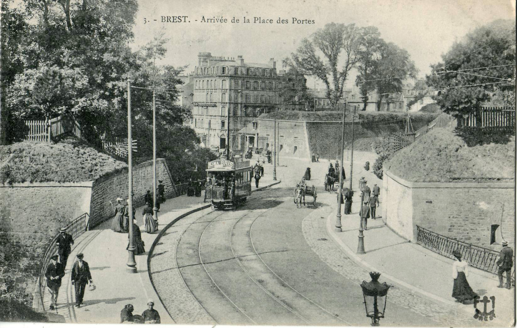 Carte postale ancienne éditée par FI Brest, n°3 : BREST - Arrivée de la Place des Portes